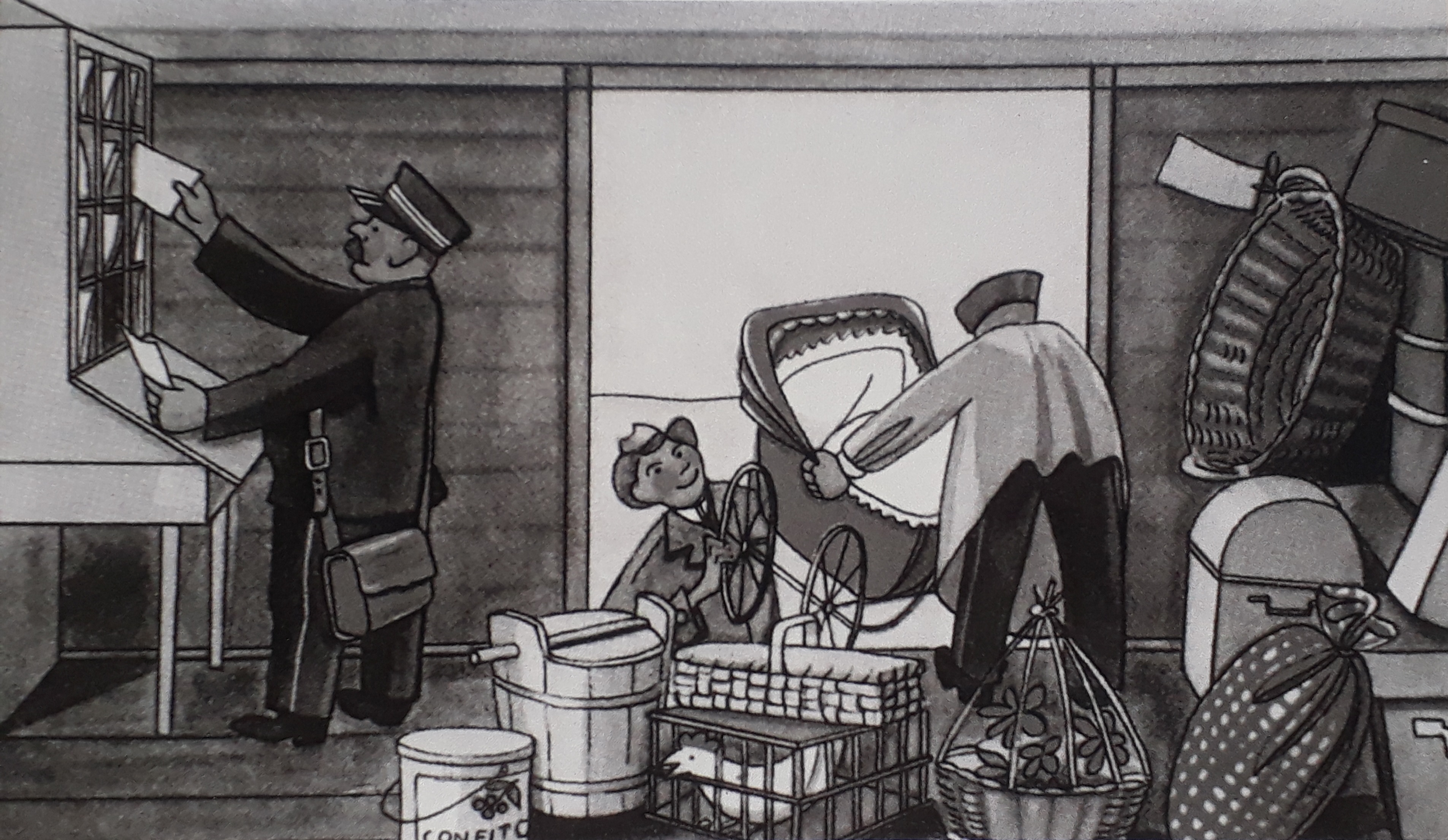 Illustration aus «Alois» von Cili Ringgenberg, die Geschichte eines Jungen, der Kondukteur werden will. Verlag H. R. Sauerländer und Co, Aarau.